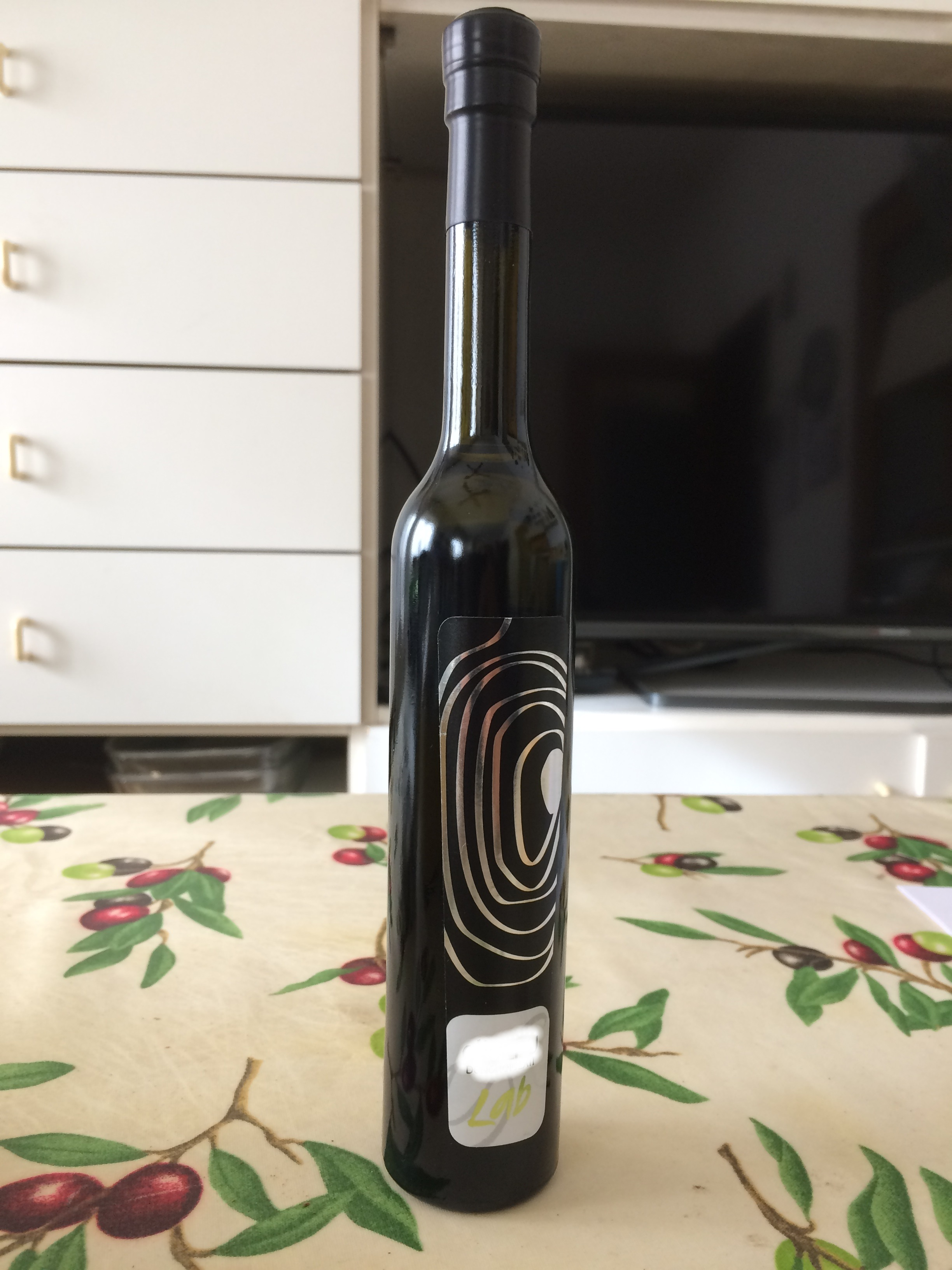 Bottiglia di olio extravergine di oliva proveniente da Arco, provincia di Trento, Lago di Garda